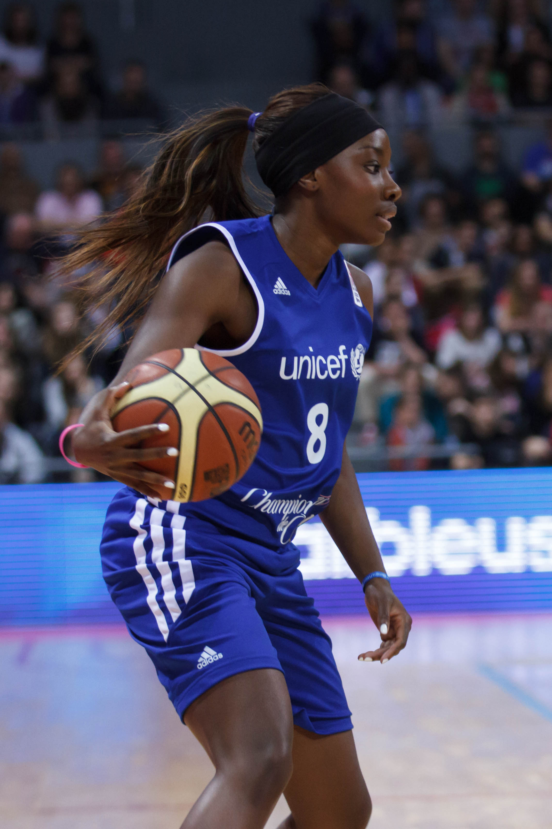 Carine Paul, match de gala championnes de cœur